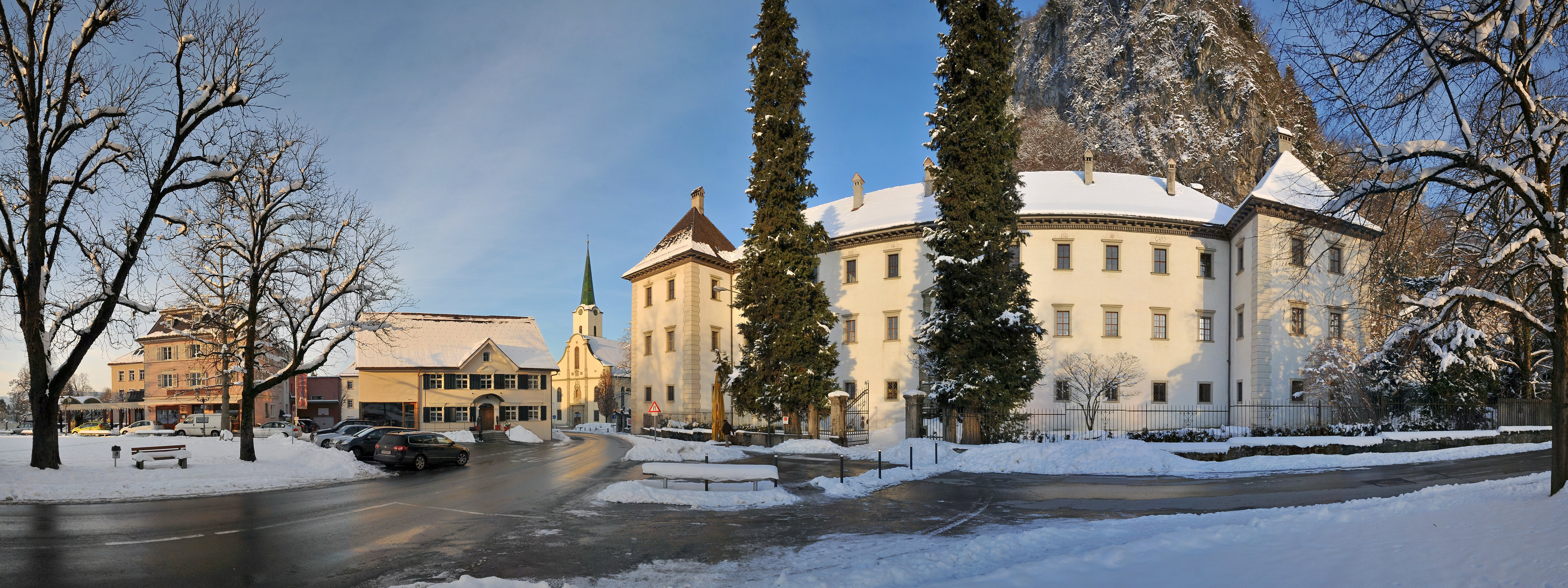 Frontpanorama Palsat Hohenems, Renaissancepalast 1563 erbaut, Fundort des Nibelungenliedes. NOTE: This image is a panorama consisting of multiple frames that were merged or stitched in software. As a result, this image necessarily underwent some form of digital manipulation. These manipulations may include blending, blurring, cloning, and colour and perspective adjustments. As a result of these adjustments, the image content may be slightly different from reality at the points where multiple images were combined. This manipulation is often required due to lens, perspective, and parallax distortions.